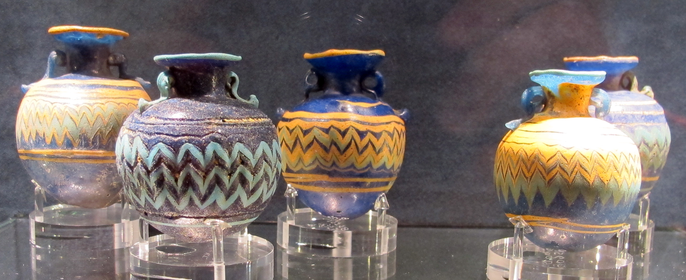 Museo archeologico nazionale di Ferrara This is a photo of a monument which is part of cultural heritage of Italy.